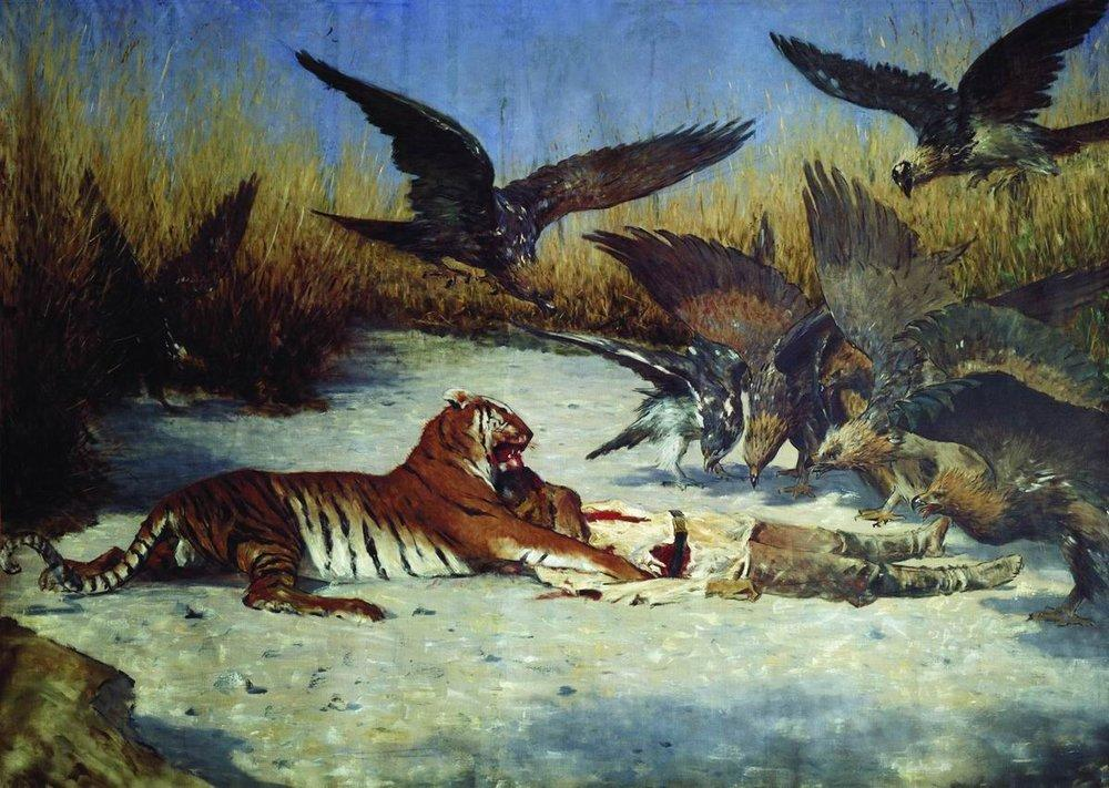 Людоед